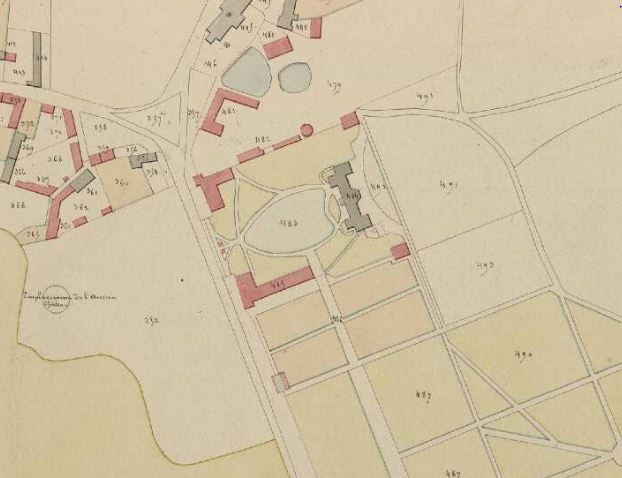 Extrait du cadastre napoléonien réalisé en 1830 montrant le l'ancien et le nouveau château de Heuqueville.